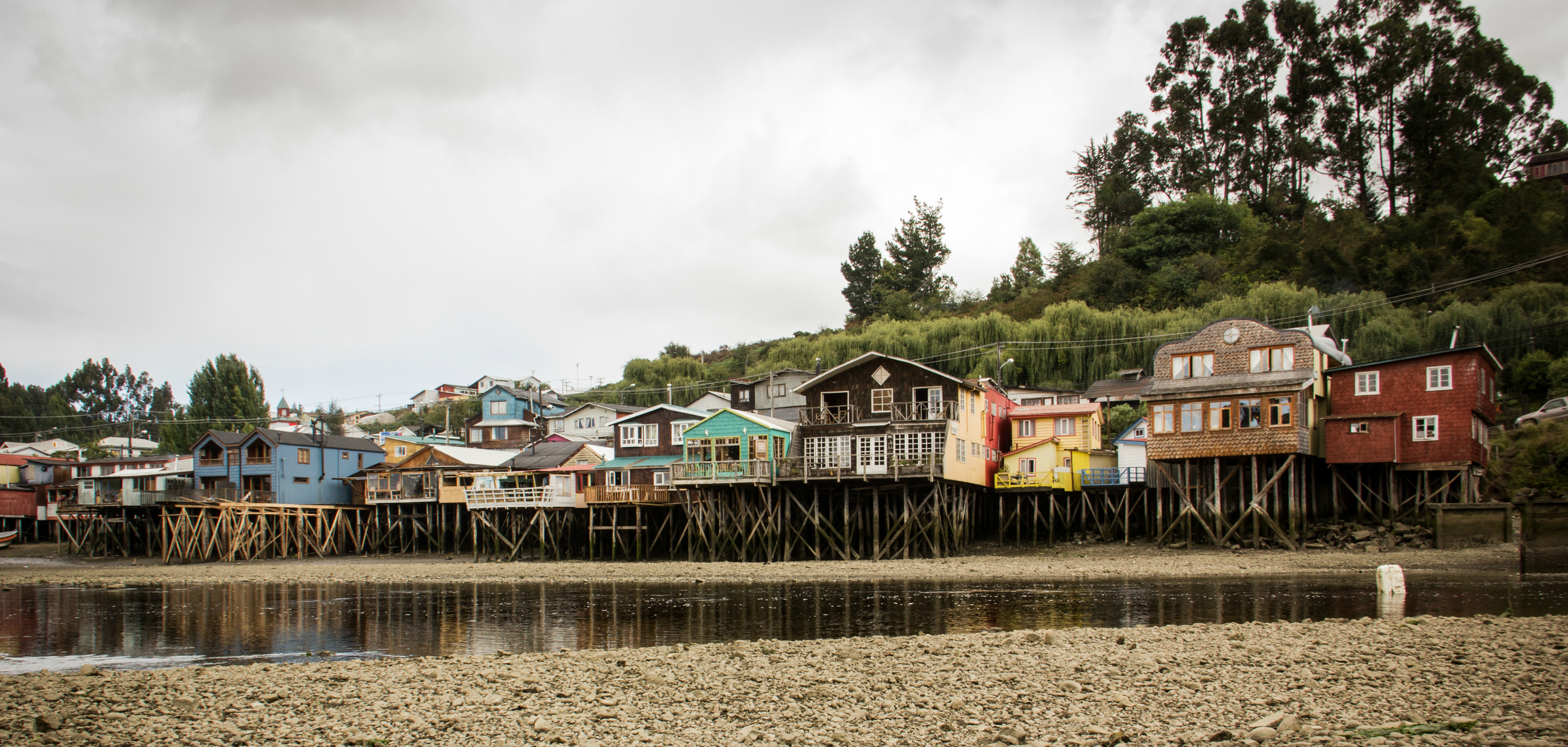 Chiloe - X Region